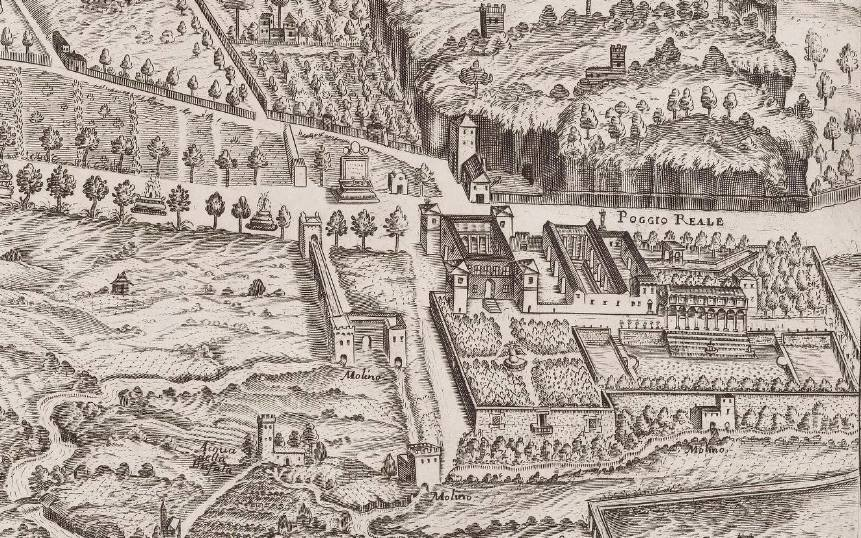 Carta di Napoli di A. Baratta (1670). Particolare della Villa di Poggio Reale.